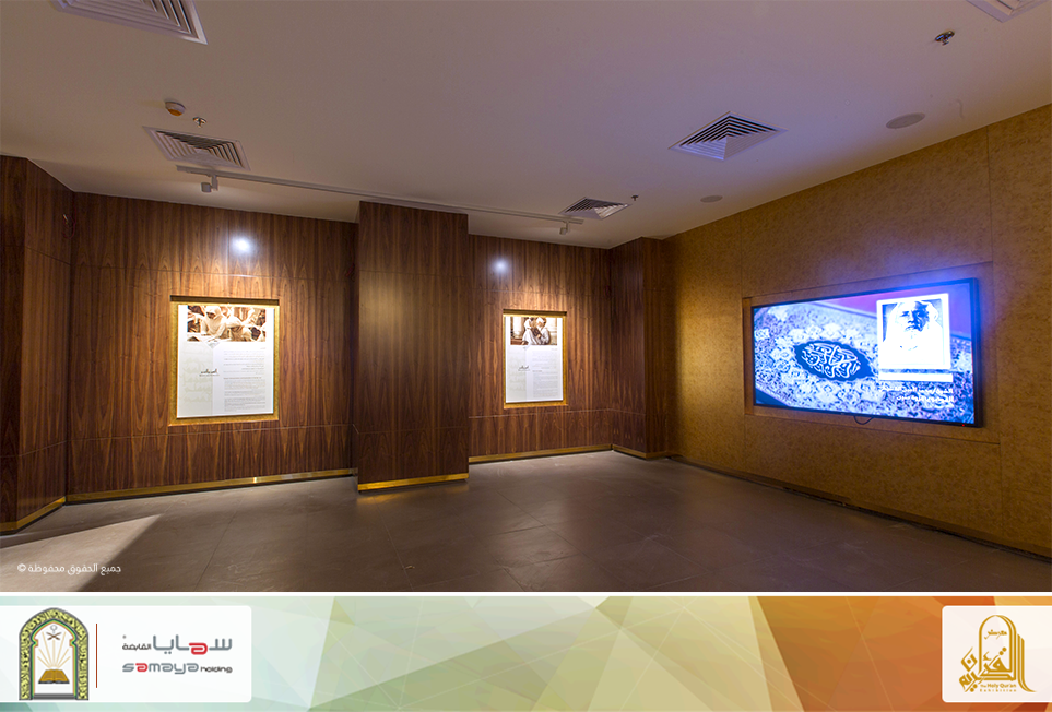 صورة من قاعة التفسير والتدبر